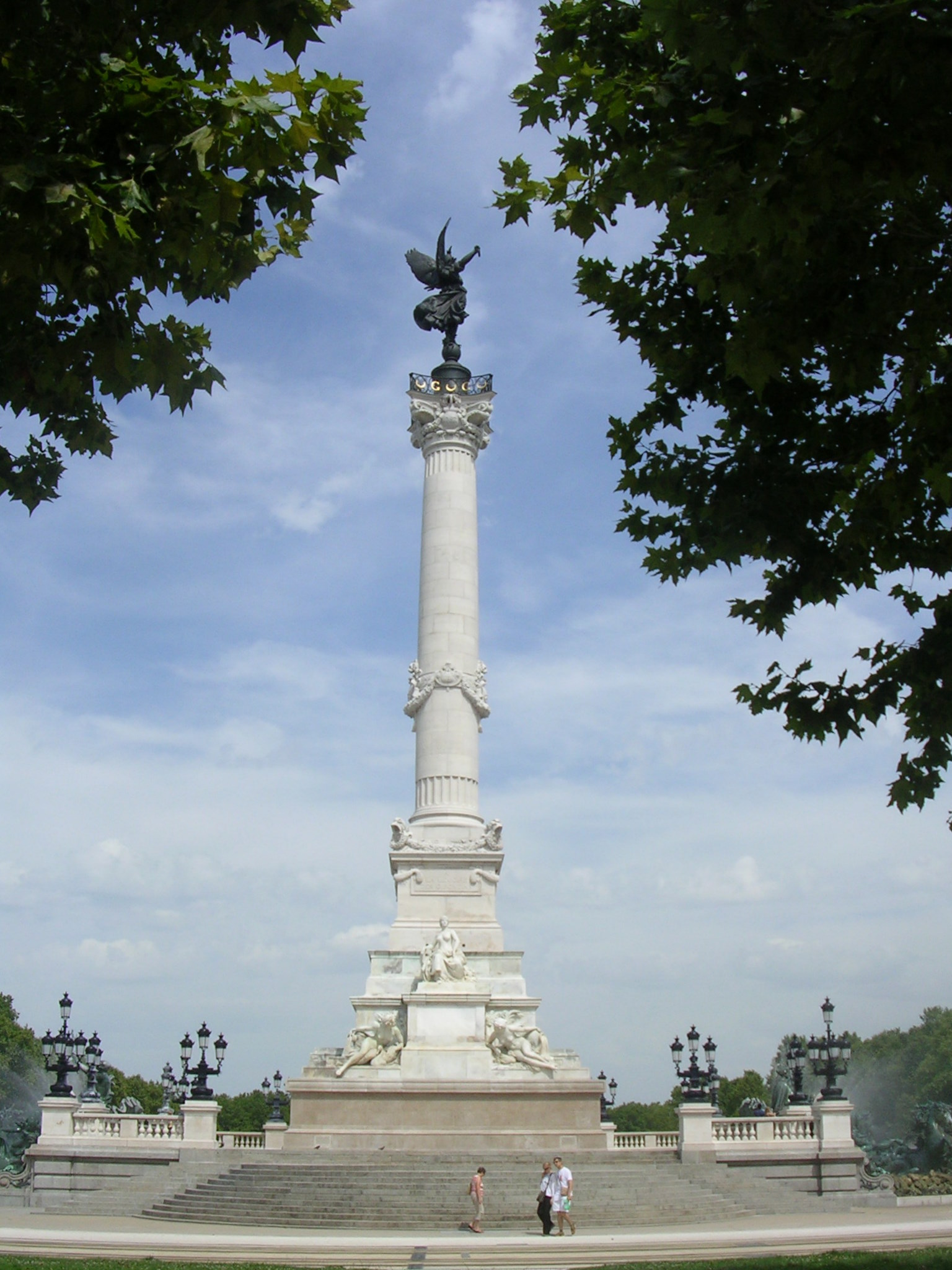 Le monument aux Girondins, à Bordeaux, dans le département français de la Gironde